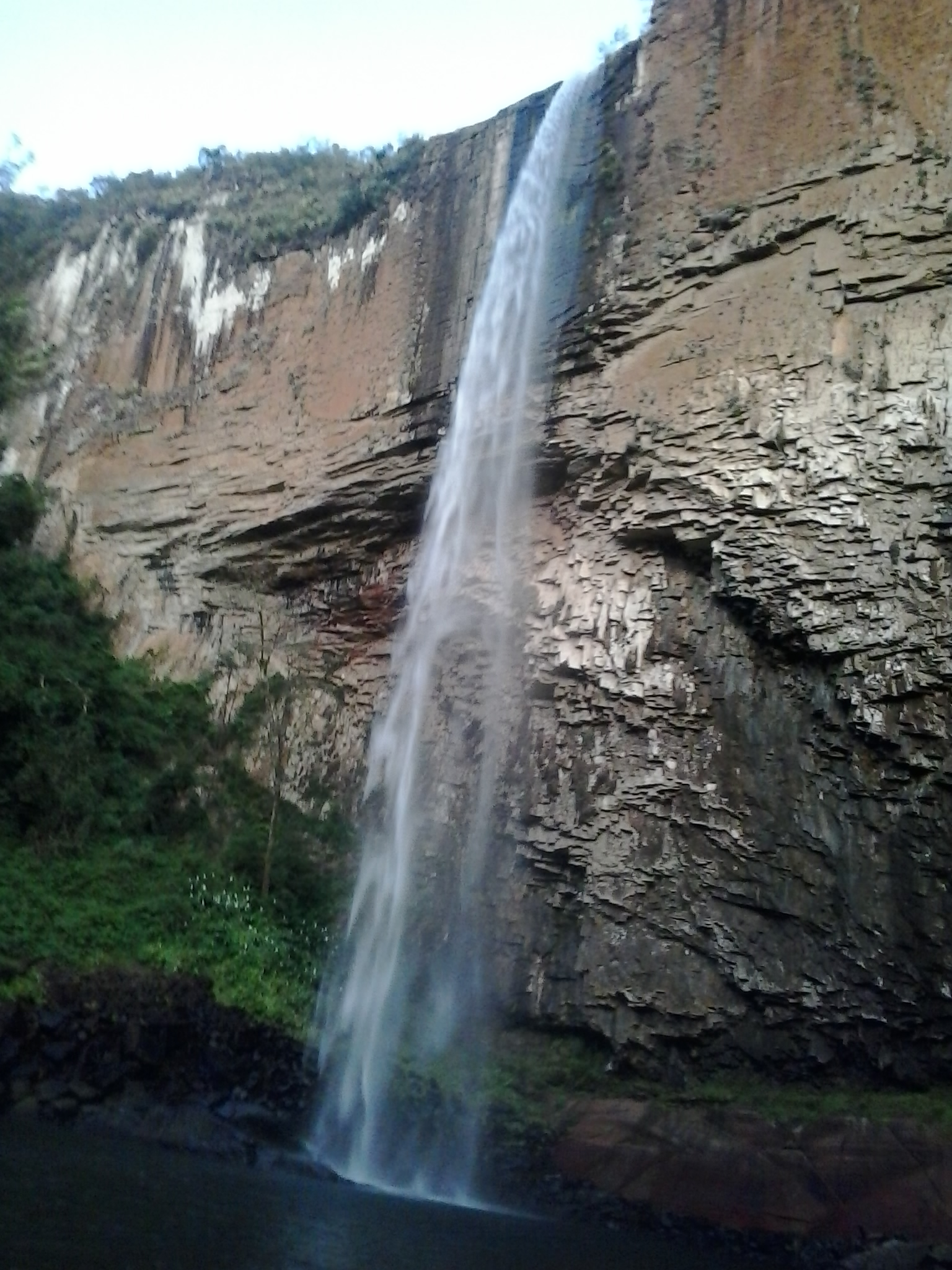 Cascata do Chuvisqueiro, salto de 76m de altura